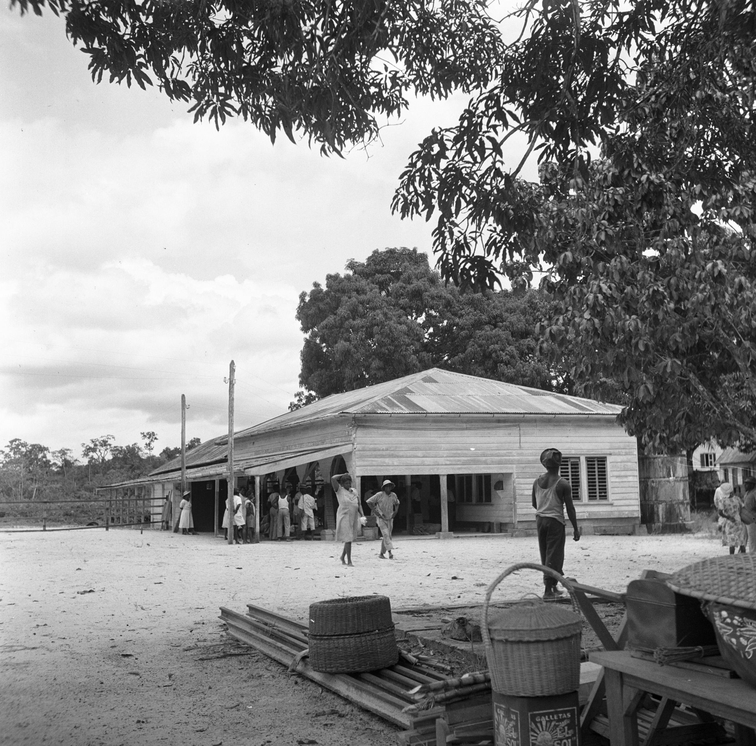 Collectie / Archief : Fotocollectie Van de Poll Reportage / Serie : Reis naar Suriname en de Nederlandse Antillen Beschrijving : Het station van de goudveldentrein bij Kwakoegron Datum : 1947 Locatie : Kwakoegron, Suriname Trefwoorden : stations Fotograaf : Poll, Willem van de Auteursrechthebbende : Nationaal Archief Materiaalsoort : Negatief (zwart/wit) Nummer archiefinventaris : bekijk toegang 2.24.14.02 Bestanddeelnummer : 252-5974